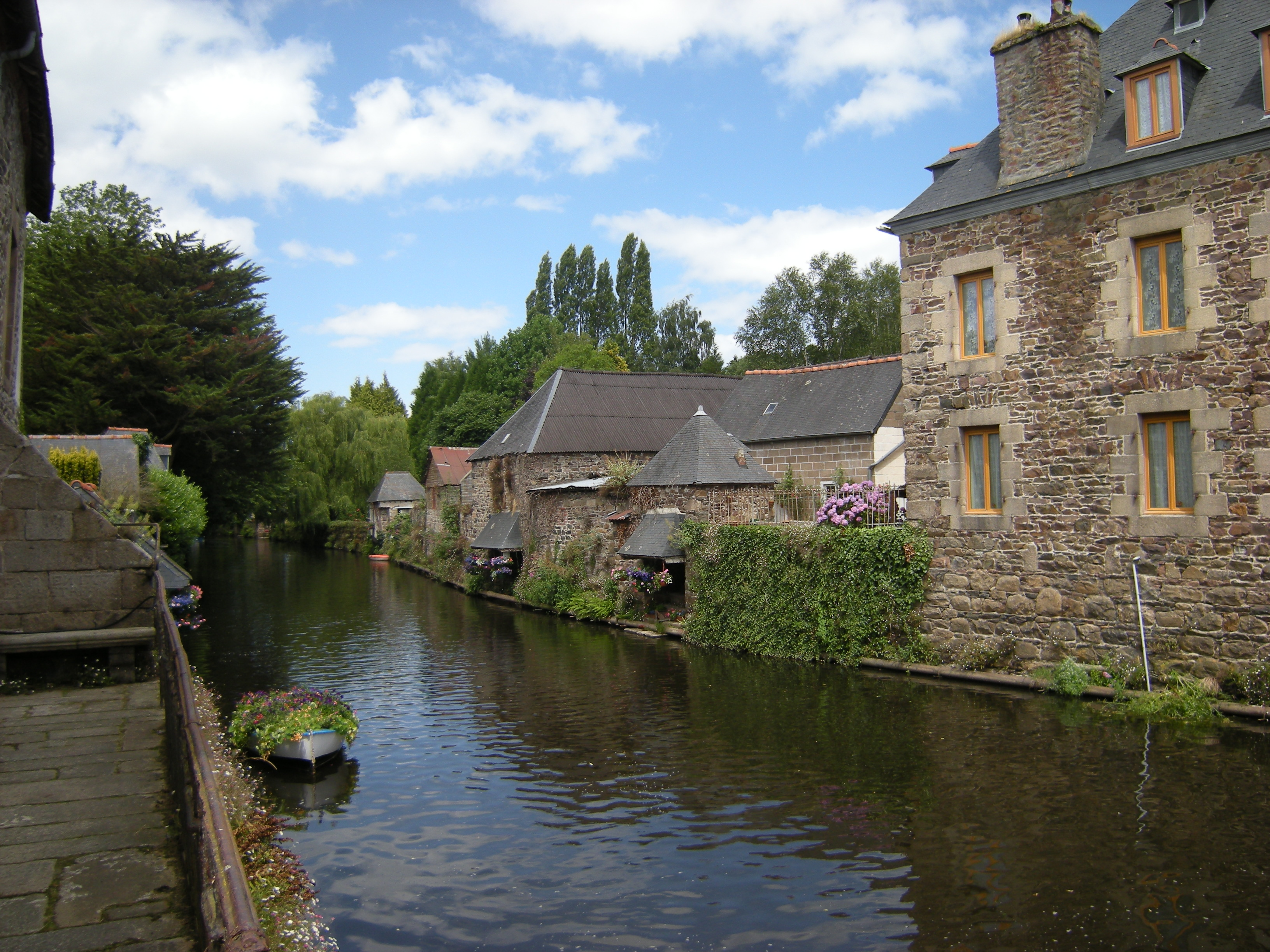 Festival de musique mécanique de Pontrieux, 2009, le Trieux à Pontrieux